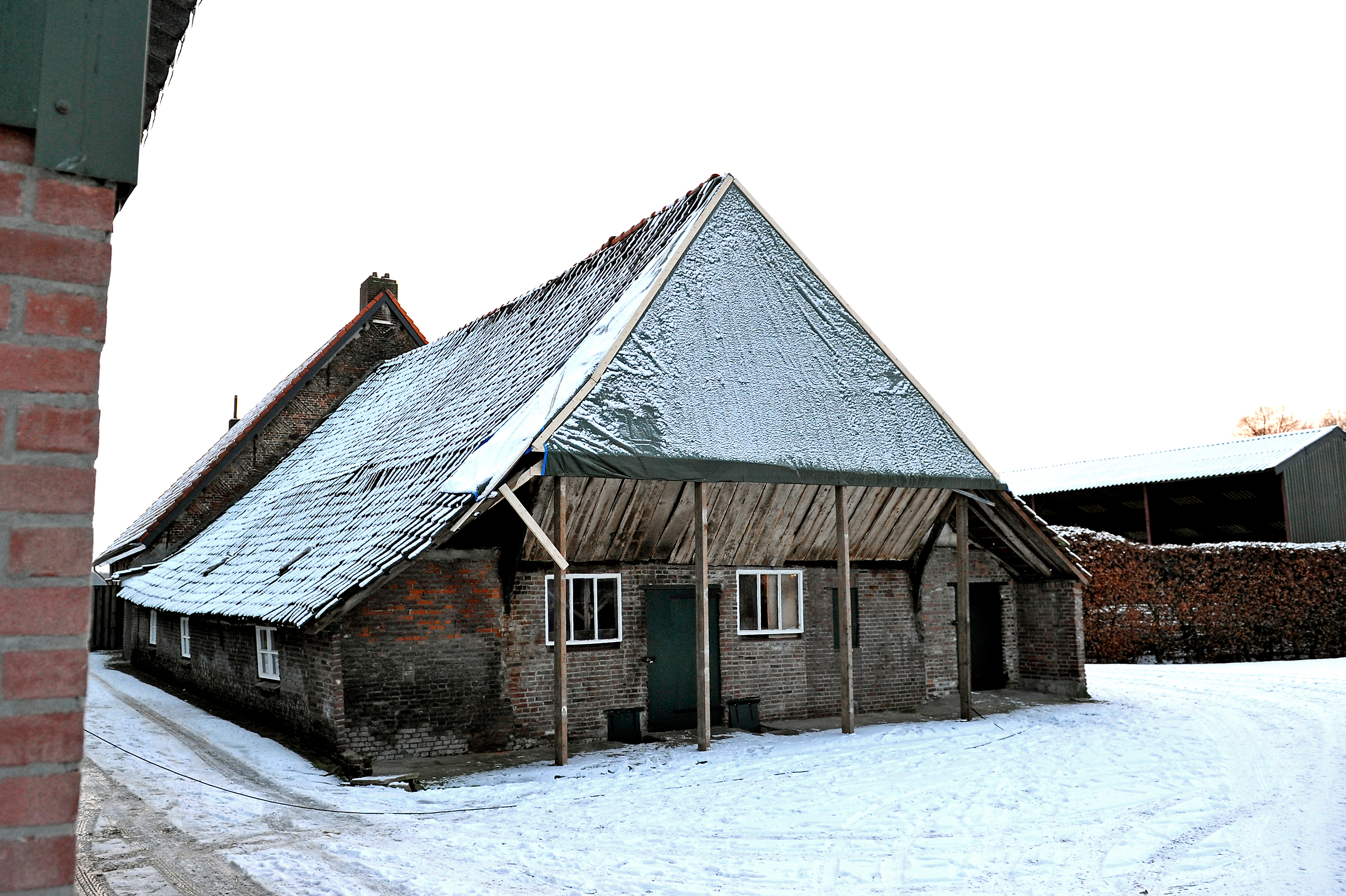 De stal van de Armenhoef in Best